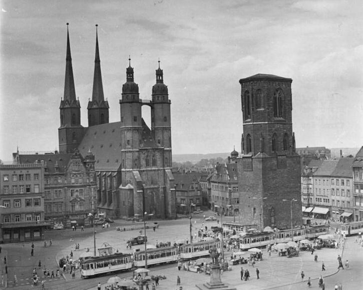 Halle, Markt, Marienkirche, "Roter Turm" Zentralbild Schurig 16.9.1964 Stadtansichten von Halle-Saale Blick auf den Markt mit seinen bekannten fünf Türmen: der rote Turm ist 458 Jahre alt (rechts) und die vier Türme der Marktkirche (links).